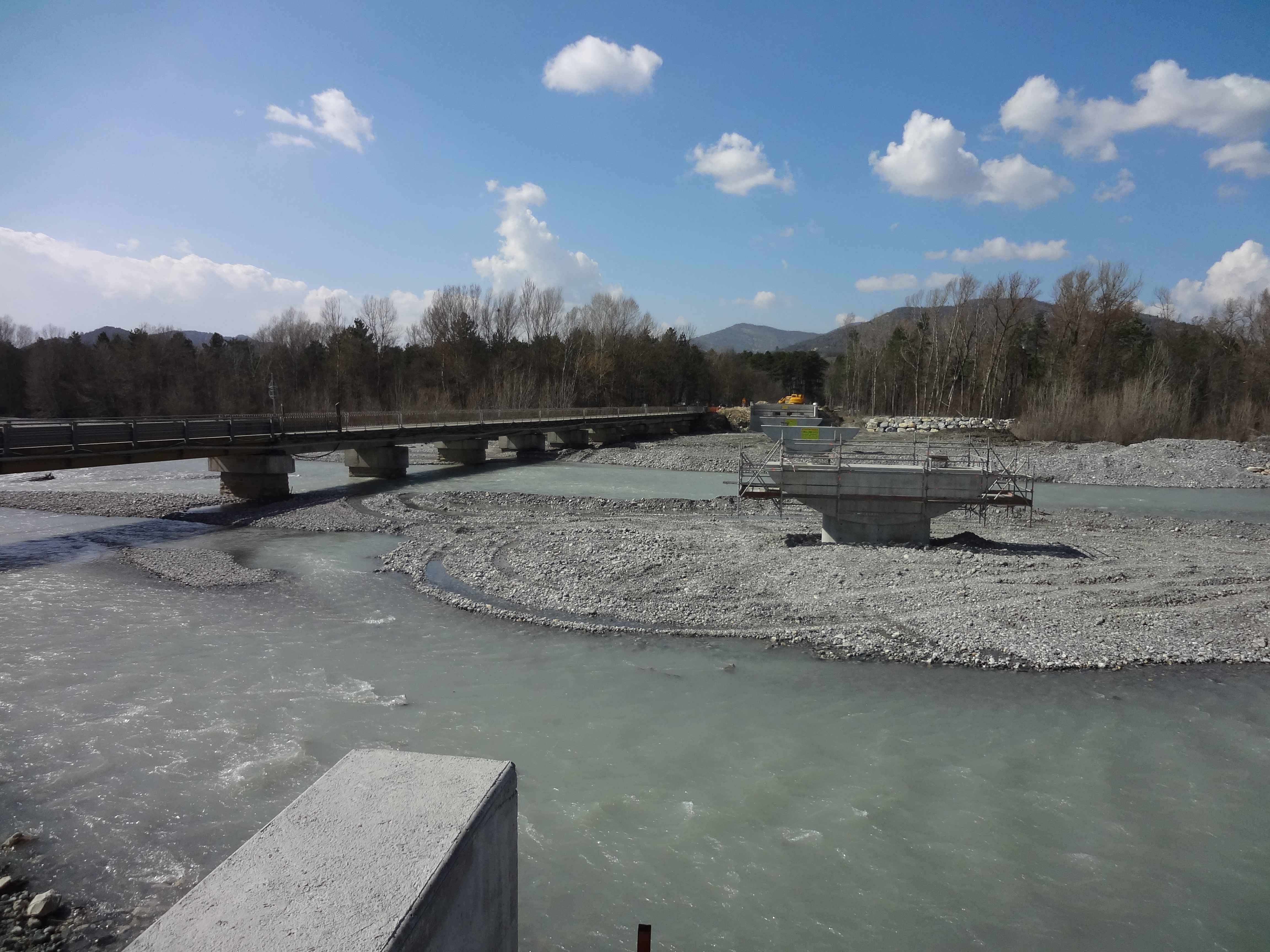 entre Mallemoisson et le Chaffaut-Saint-Jurson